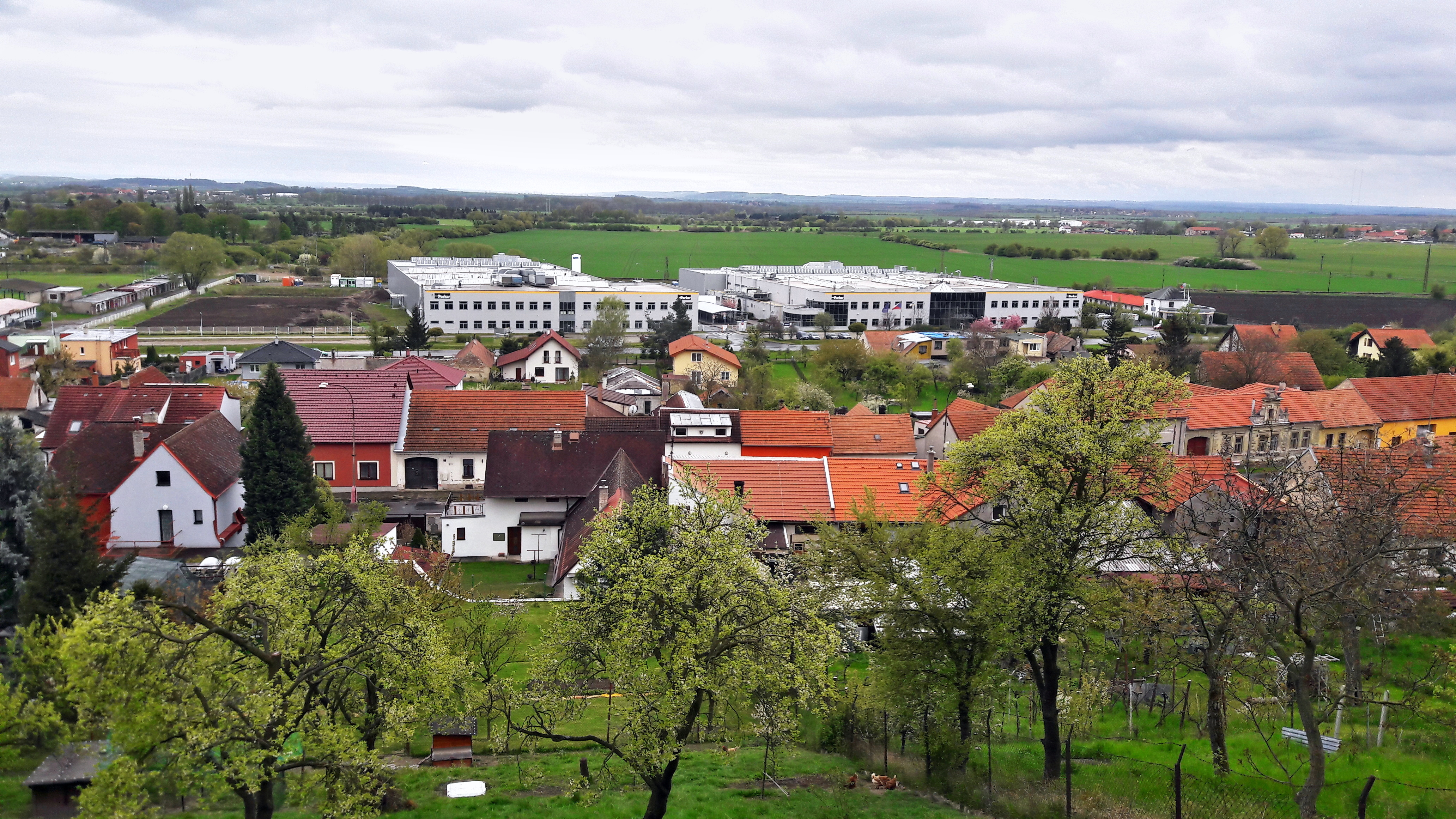 Sadská